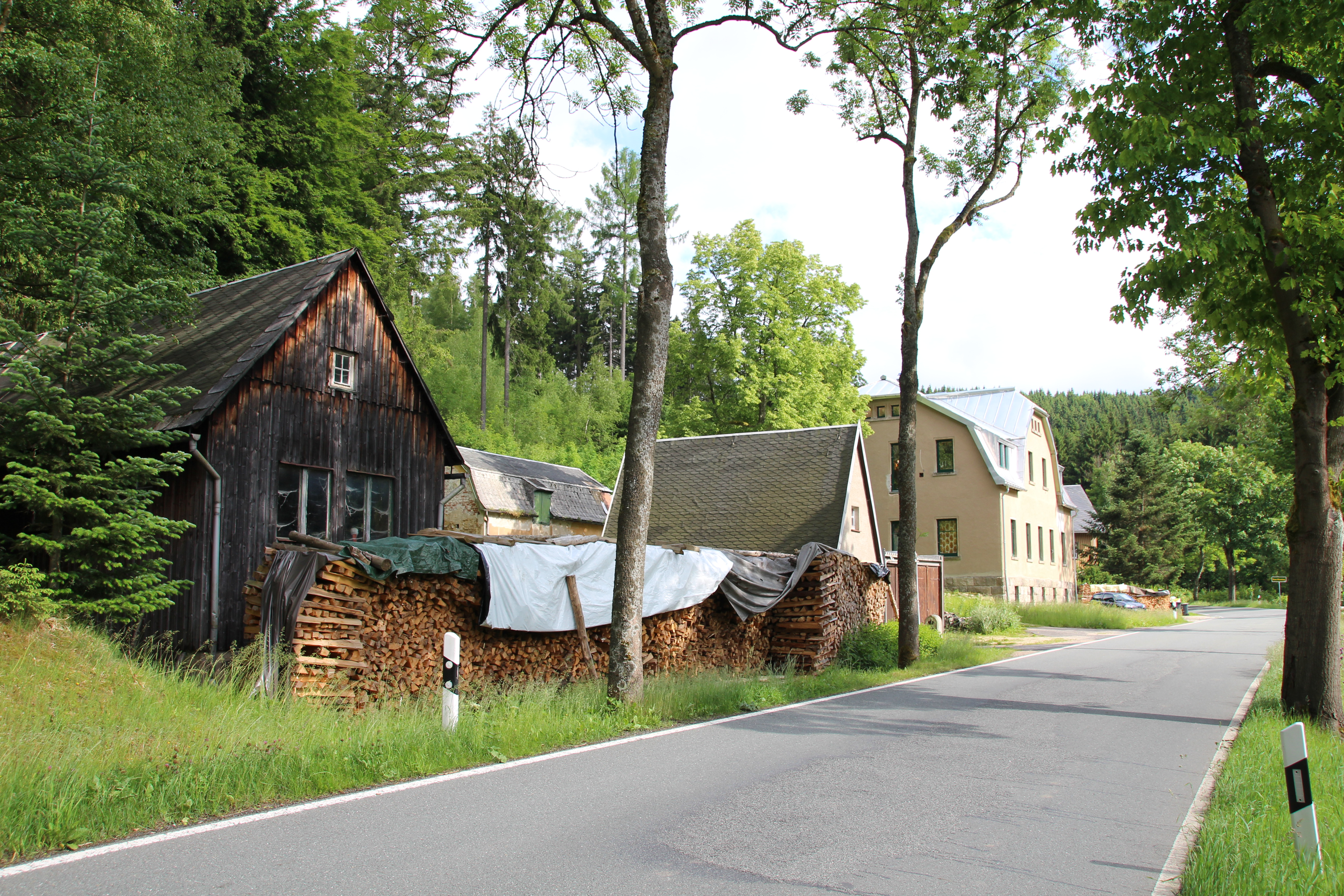 Neues Wiesenhaus, eine Siedlung von wenigen Häusern an der Wilzsch oberhalb von Wilzschhaus. Diese Siedlung ist ein Teil von Eibenstock. Das große Gebäude war früher eine Gastwirtschaft.